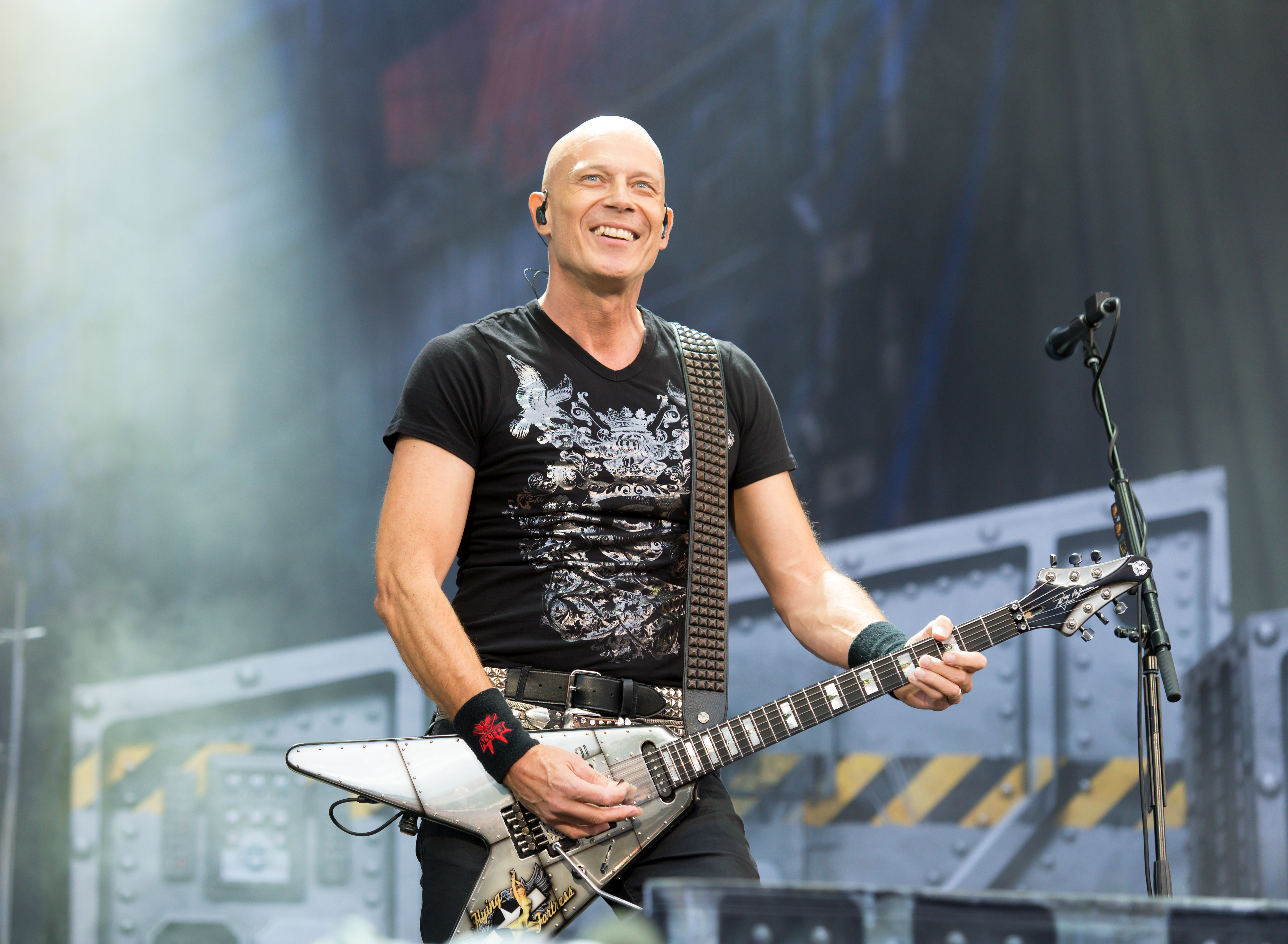 Accept beim Wacken Open Air 2017